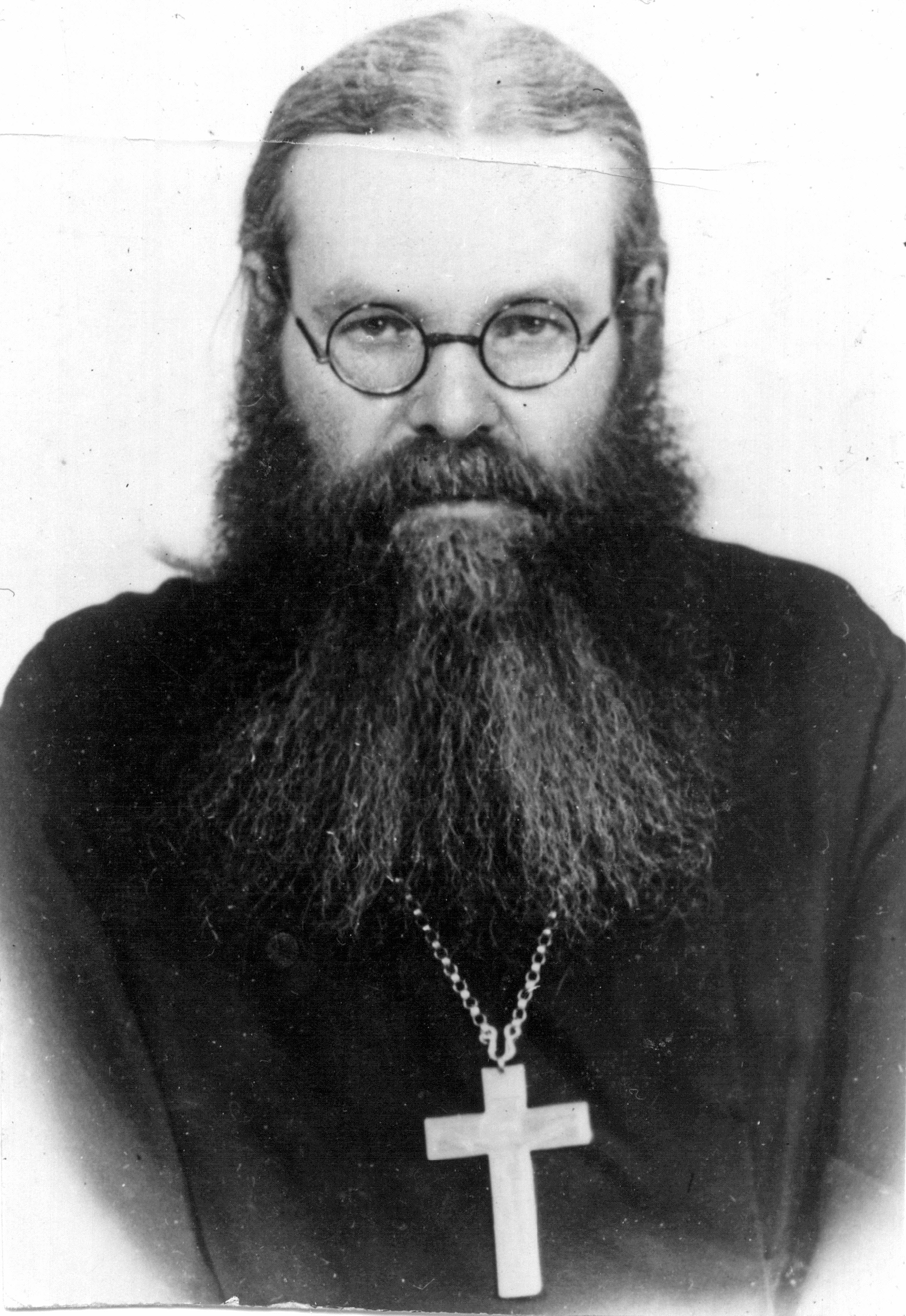 Протоиерей Валентин Семёнович Барышников